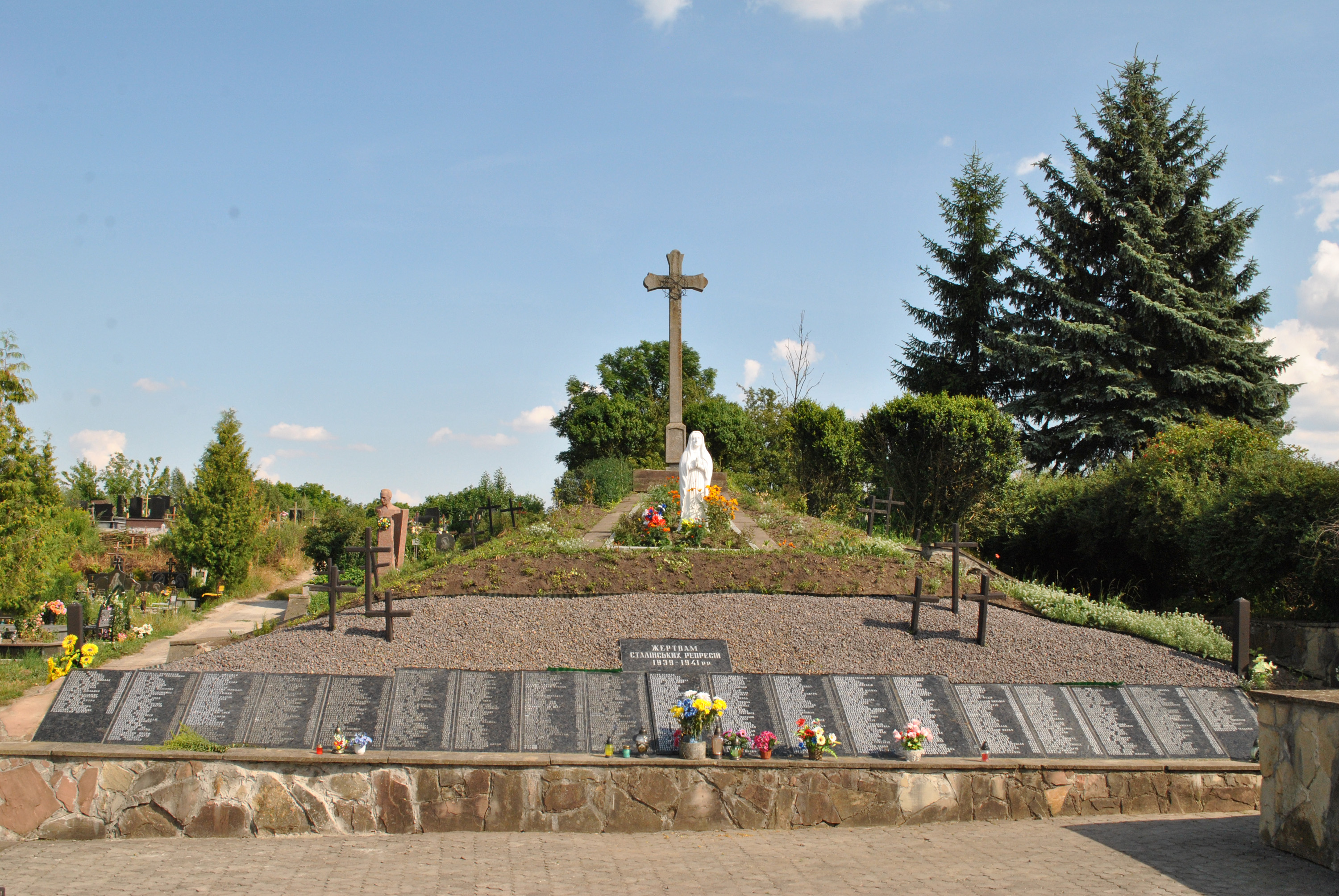 Братська могила жертв тоталітарного режиму на Микулинецькому цвинтарі в Тернополі.